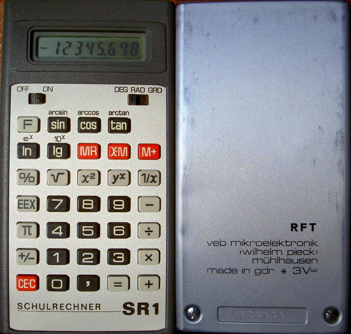 Farbwiedergabe des Fotos korrigiert...